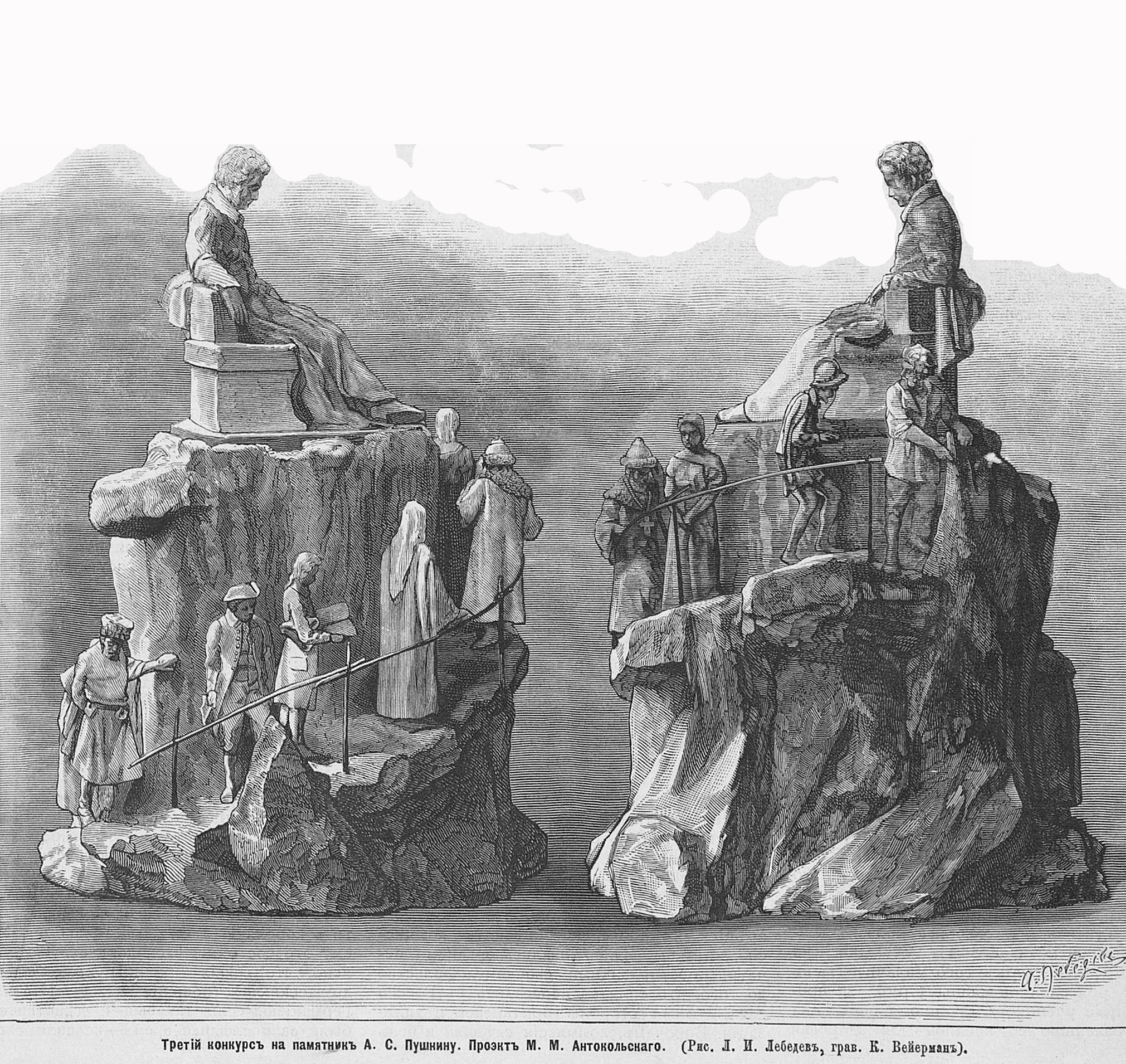 Проект памятника А. С. Пушкину, автор М. М. Антокольский, 1875 год